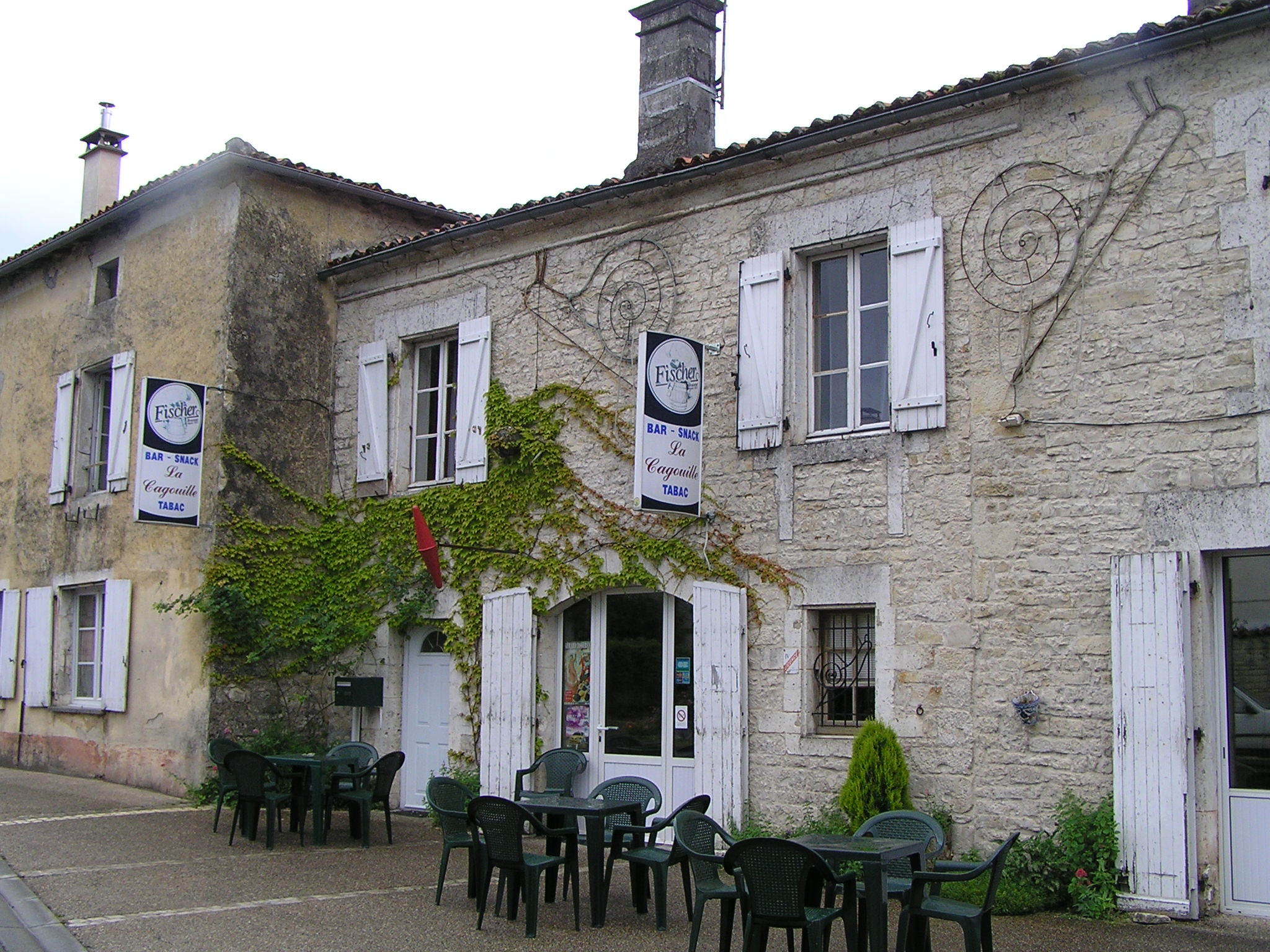 café-restaurant de Villejésus